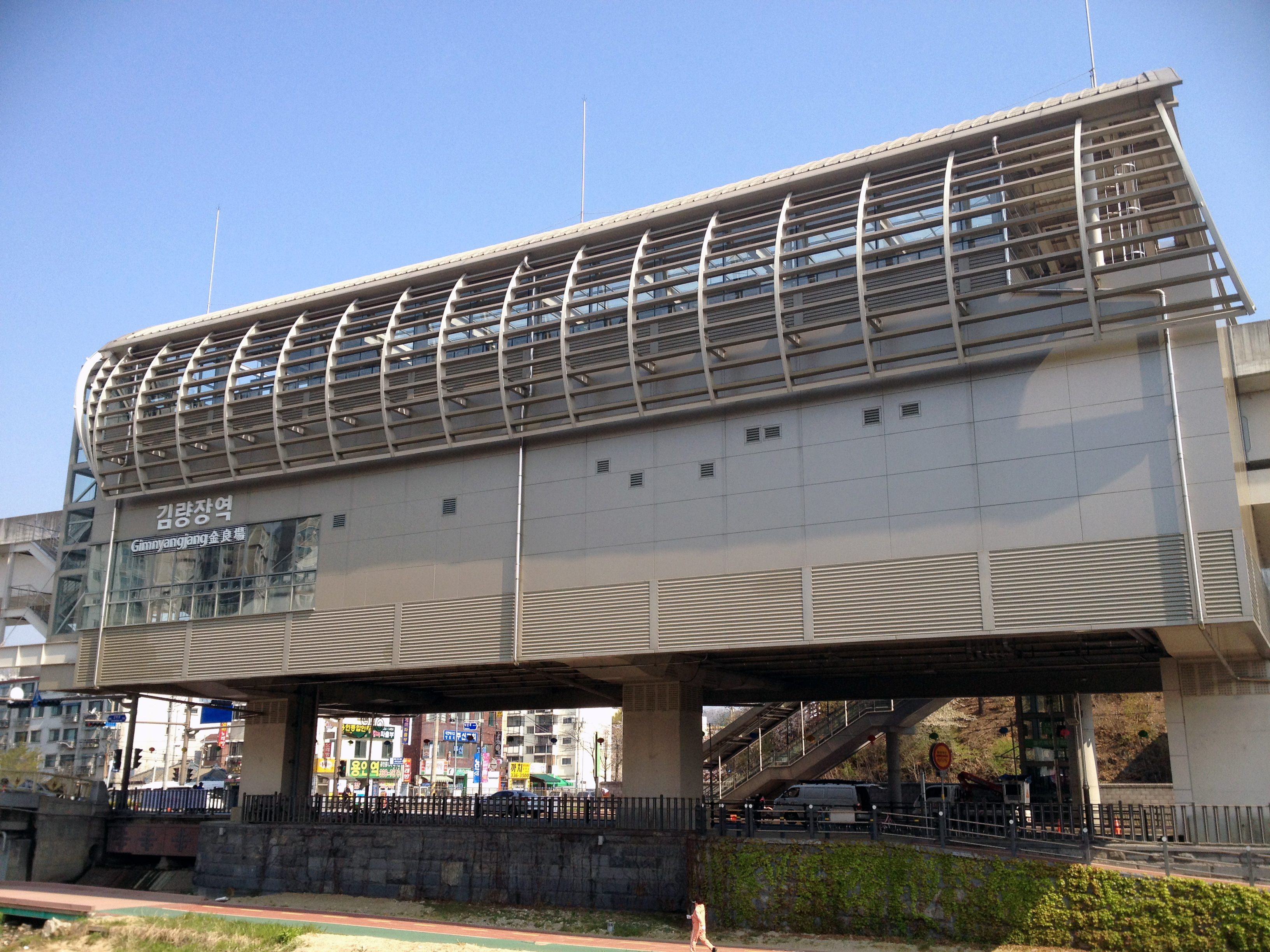 김량장역 역사